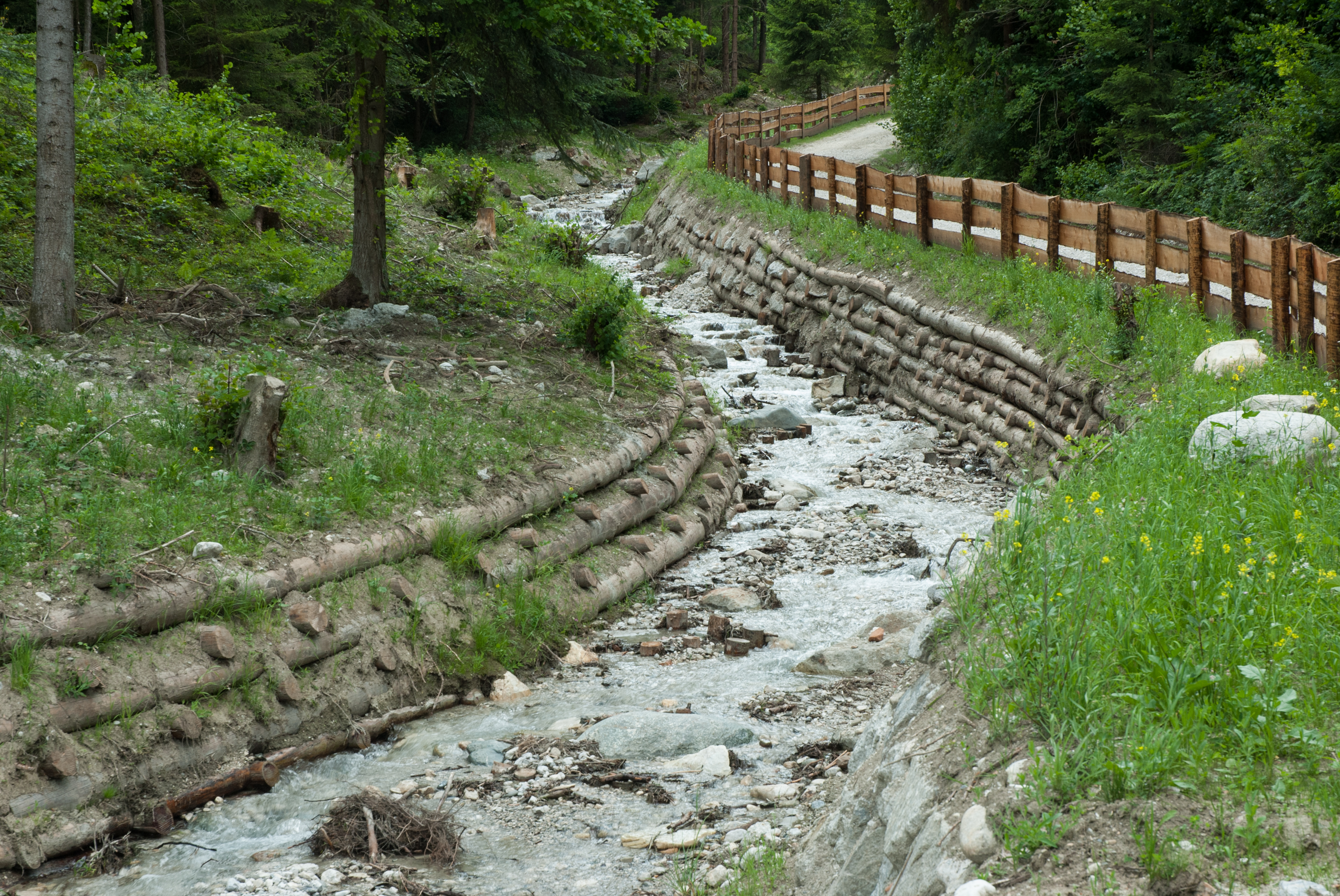 Bachverbauung mit Holzstämmen (Krainerwand) am Fallbach bei Baumkirchen